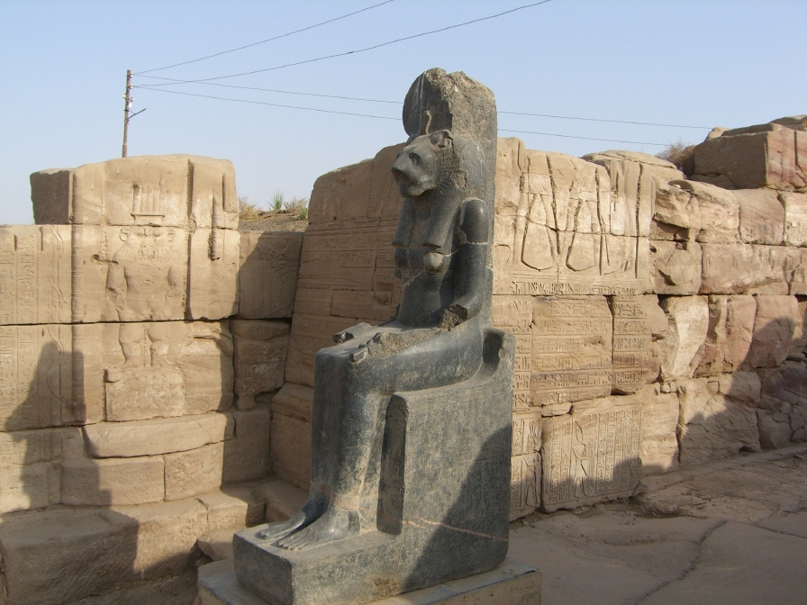 Porte du temple de Mout au nom de Ptolémée VI - Dynastie ptolémaïque